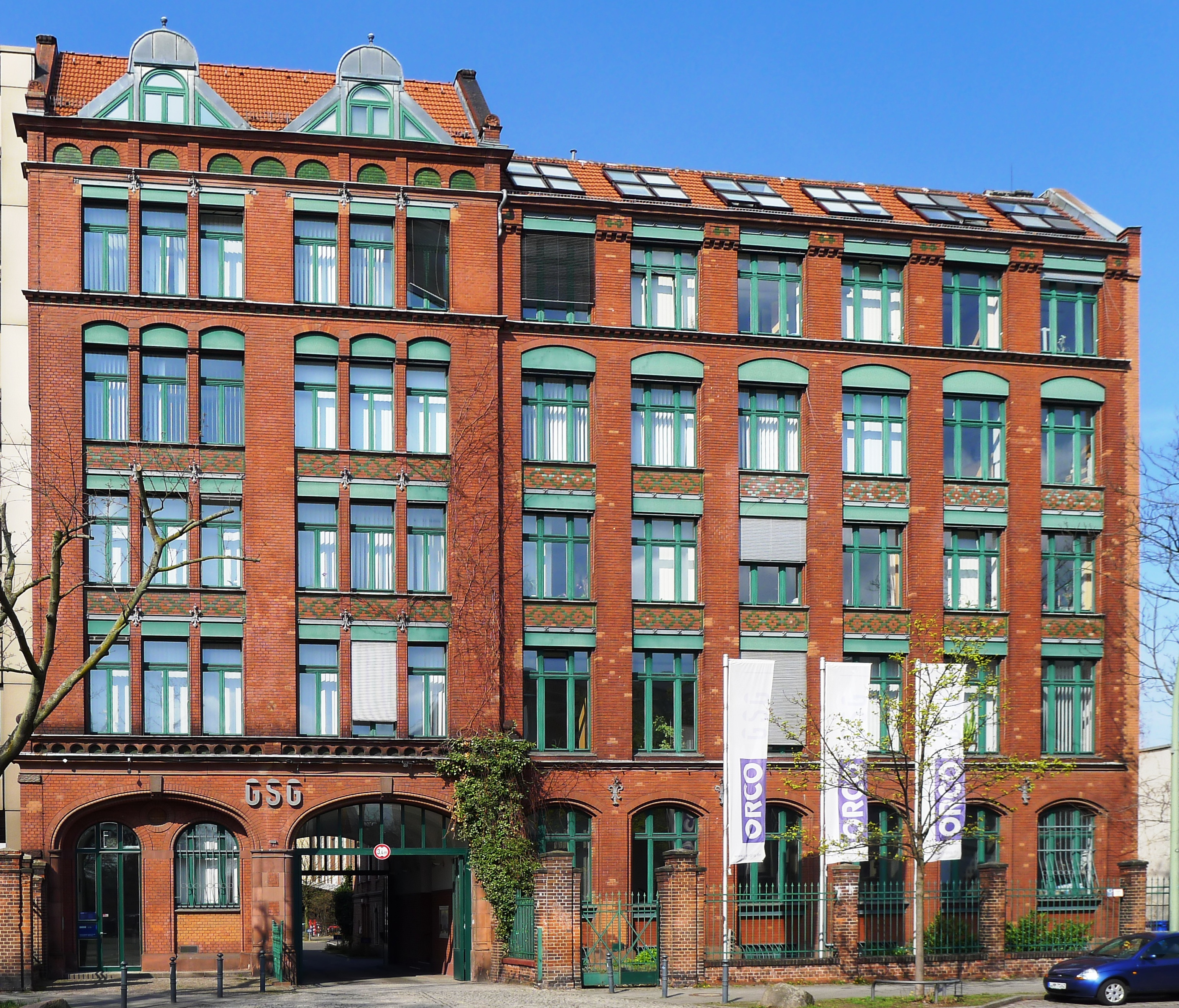 ehemaliges Gebäude der Siemens-Schuckert-Werke